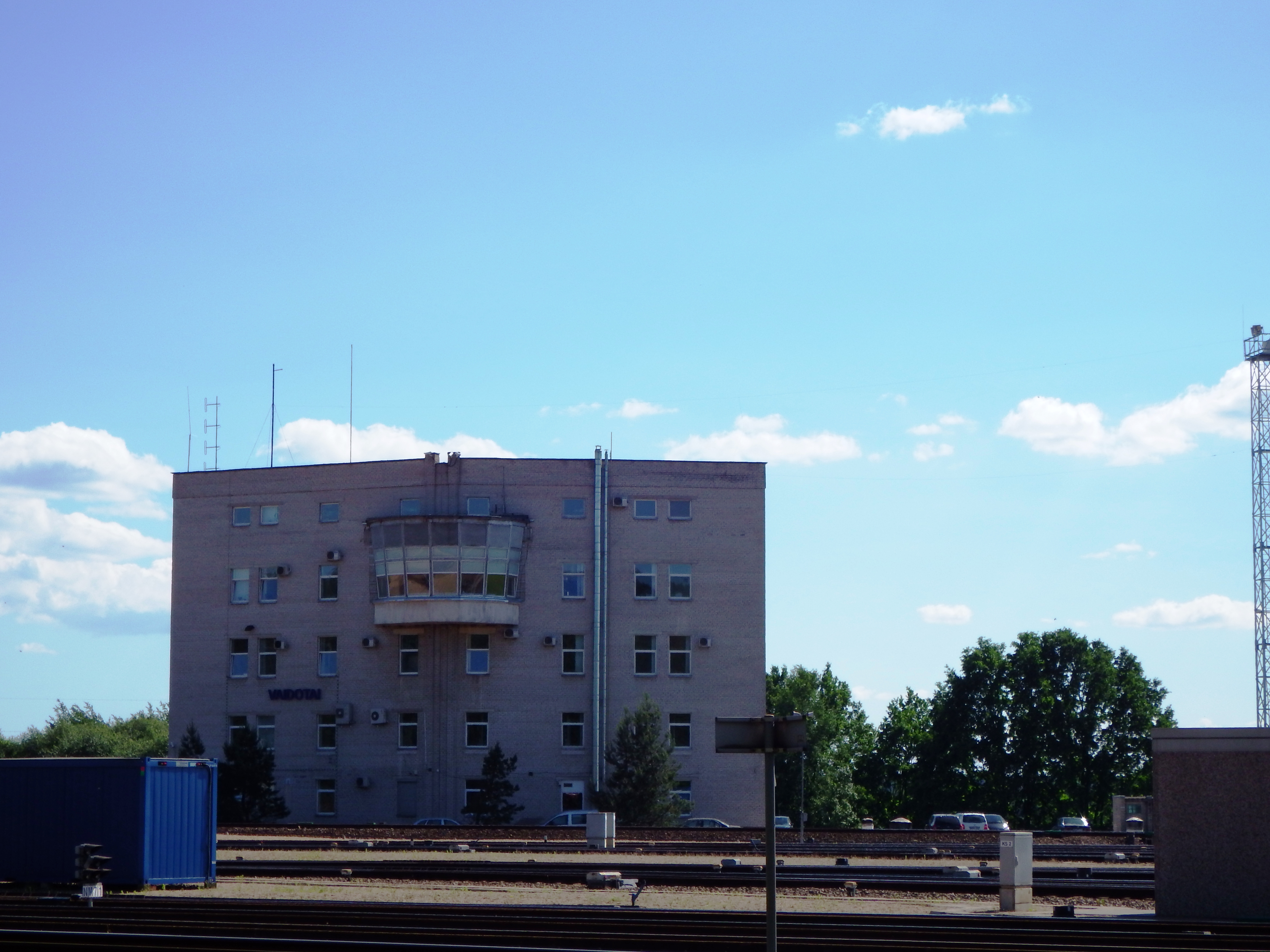 Vaidotų geležinkelio stotis, Vilnius